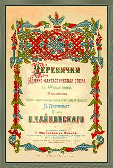 Афиша оперы "Черевички"